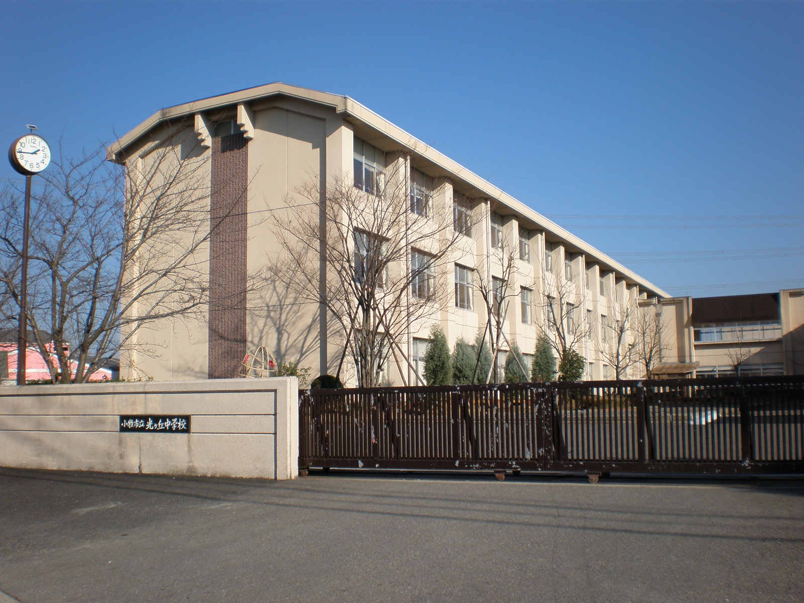 愛知県小牧市にある光ヶ丘中学校